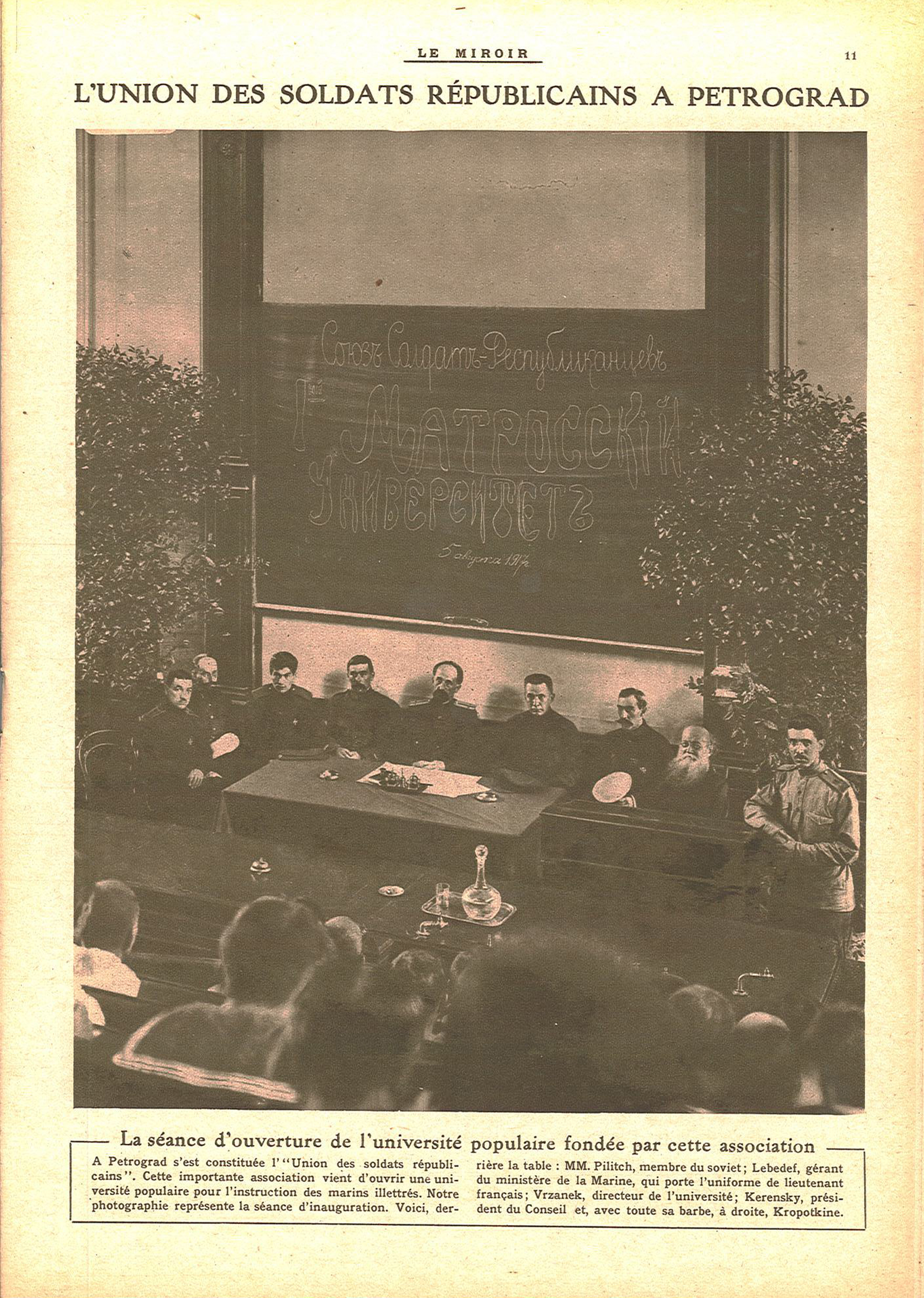 Le Miroir, n°203. Dimanche 14 octobre 1917.